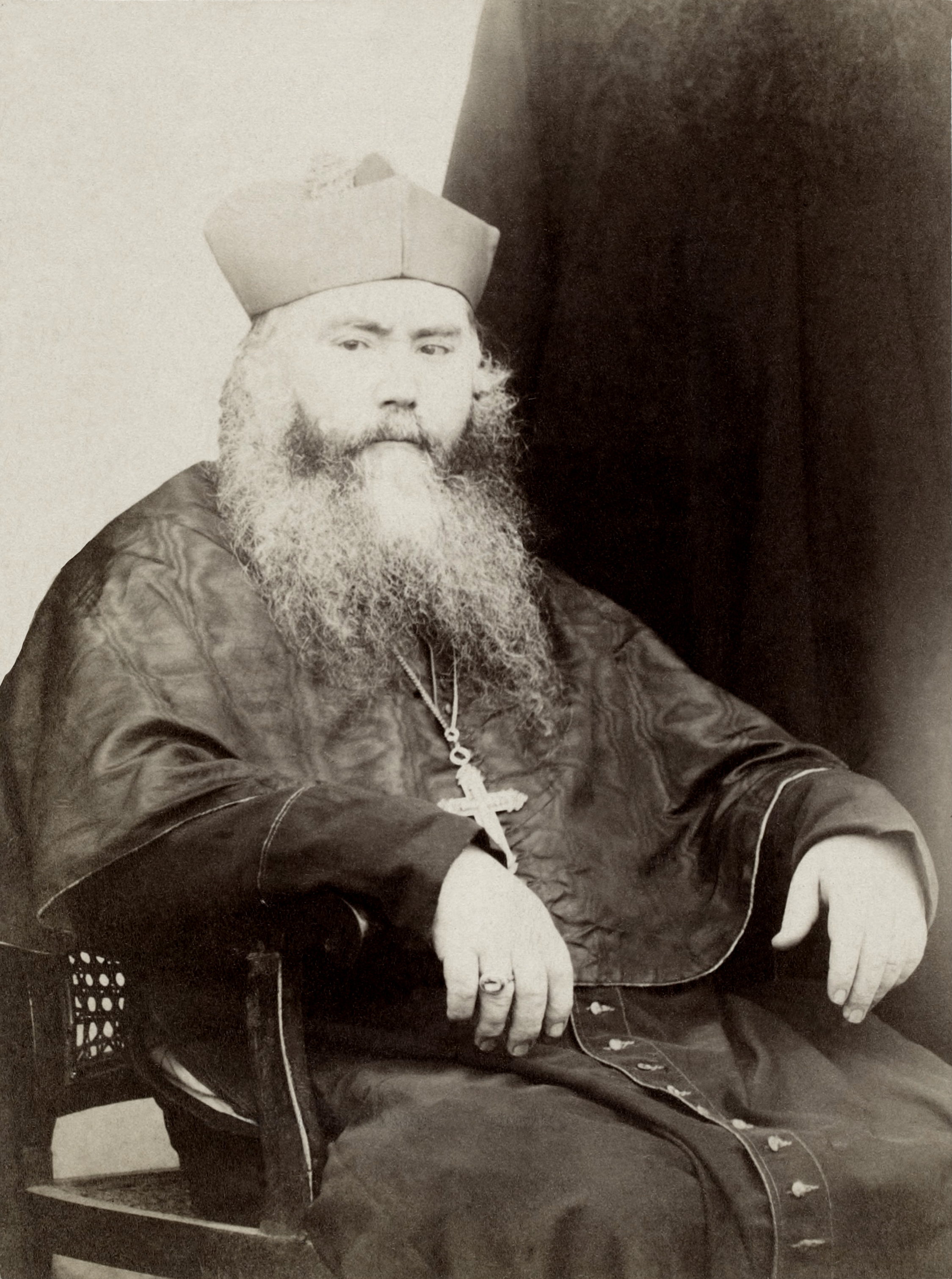 Mgr Paul-François Puginier (1835-1892), missionnaire et évêque français, Vicaire Apostolique au Tonkin occidental (futur archidiocèse d'Hanoï).